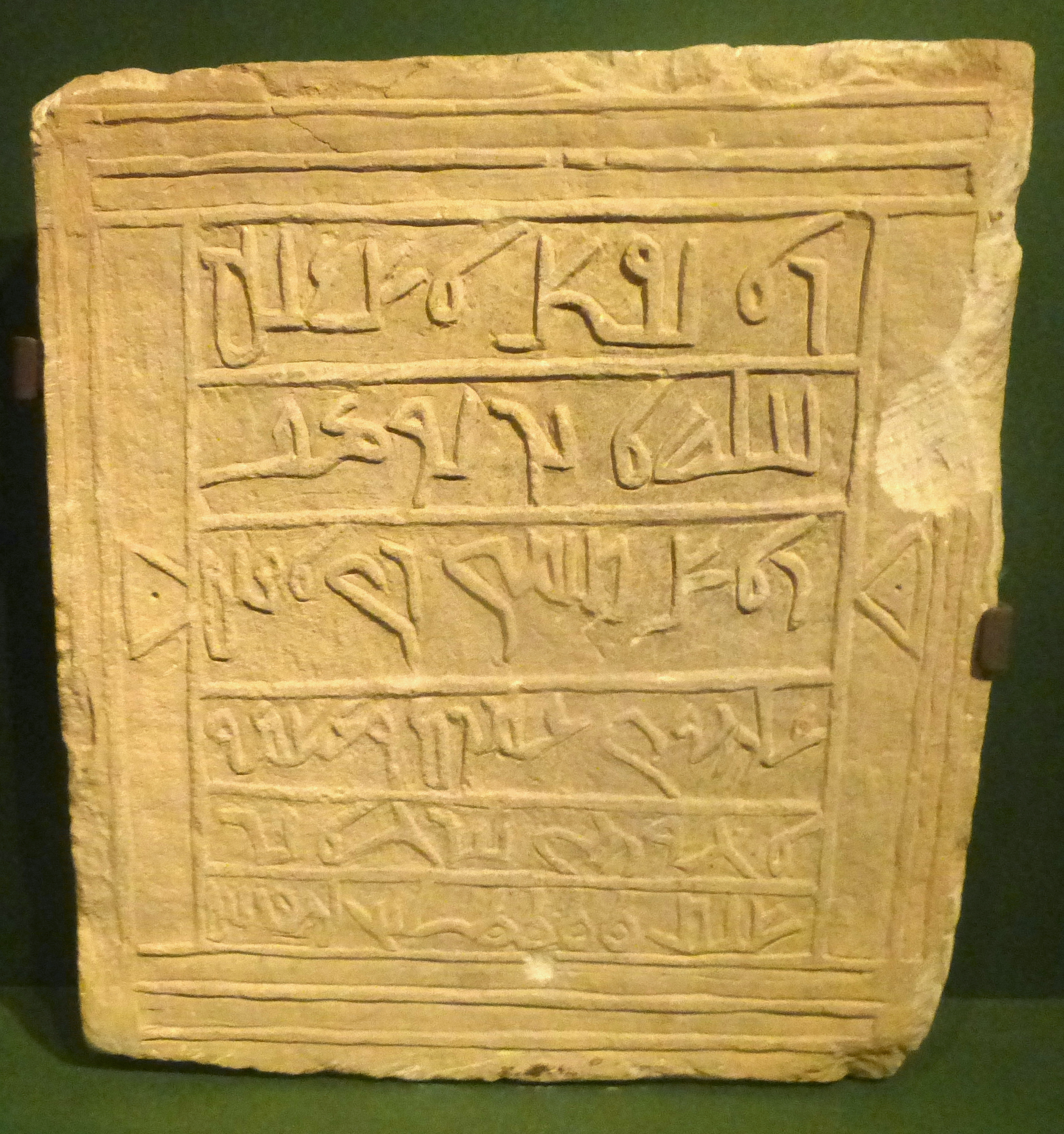 Nabataean alphabet (ナバテア文字)